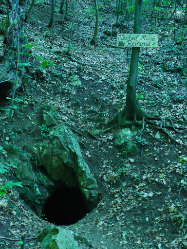 Mina romană din Sasca Montană